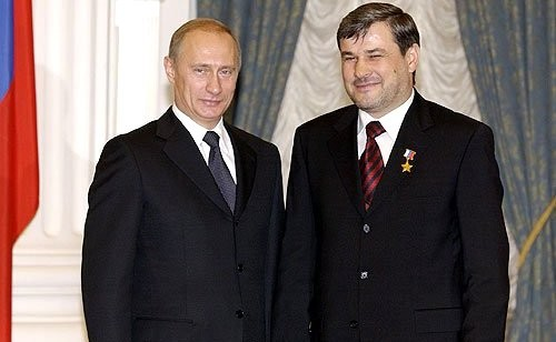 Полковник Руслан Ямадаев с Президентом РФ В.Путиным на церемонии вручения медали «Золотая звезда»